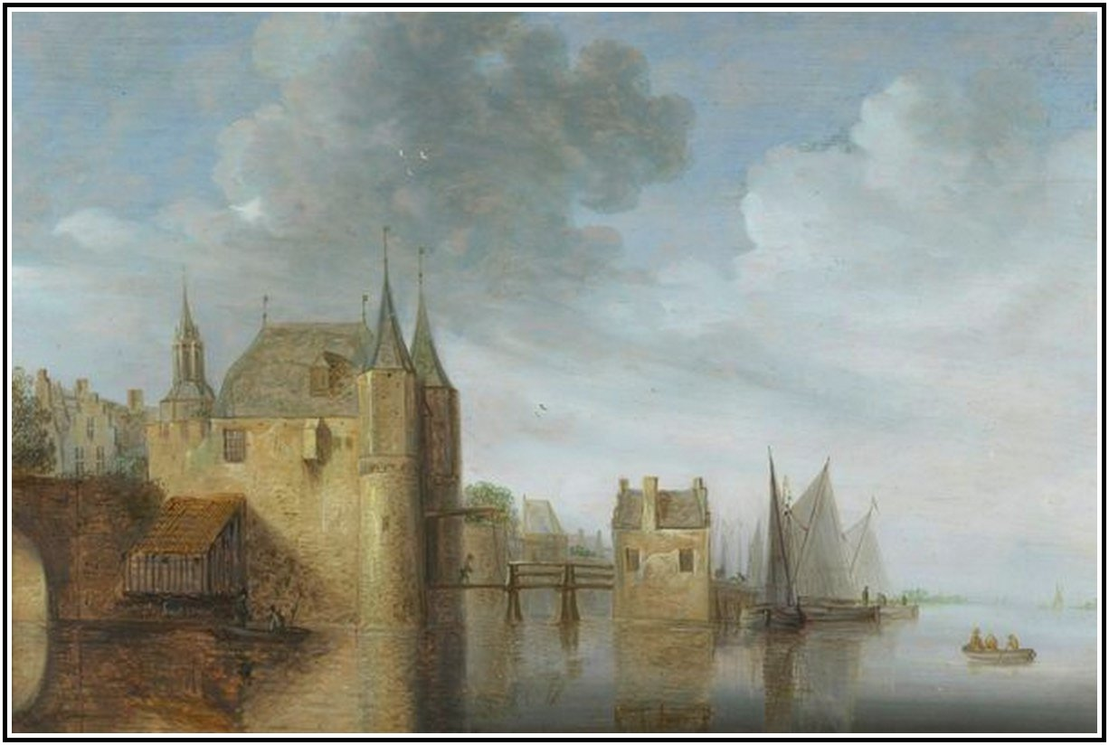 Воутер Книфф, Речной пейзаж с рыбаками на фоне замка,1645. Victoria and Albert Museum.